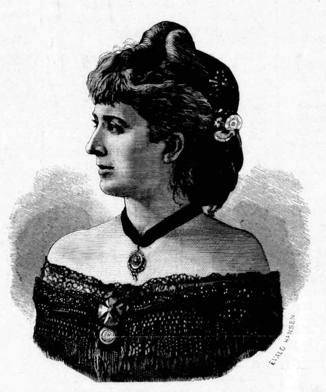 Wilhelmine Holmboe-Schenström (1842-1938)